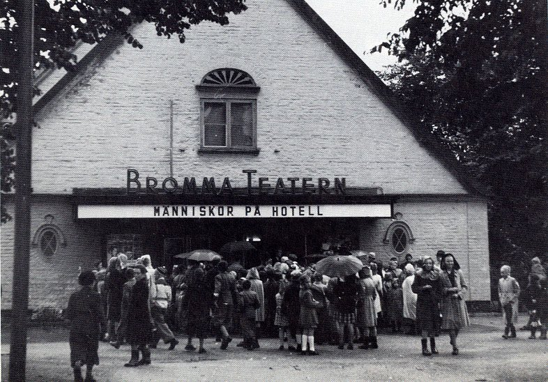 Bromma-Teatern vid Alvik i Bromma, arkitekt Gustaf E. Petterson (1855-1933). Bromma-Teatern byggdes 1921-1922. Första föreställningen gavs den 27 september 1921. Filmen Människor på hotell (Week-End at the Waldorf (1945)) som annonseras på bilden hade premiär 6 maj 1946.